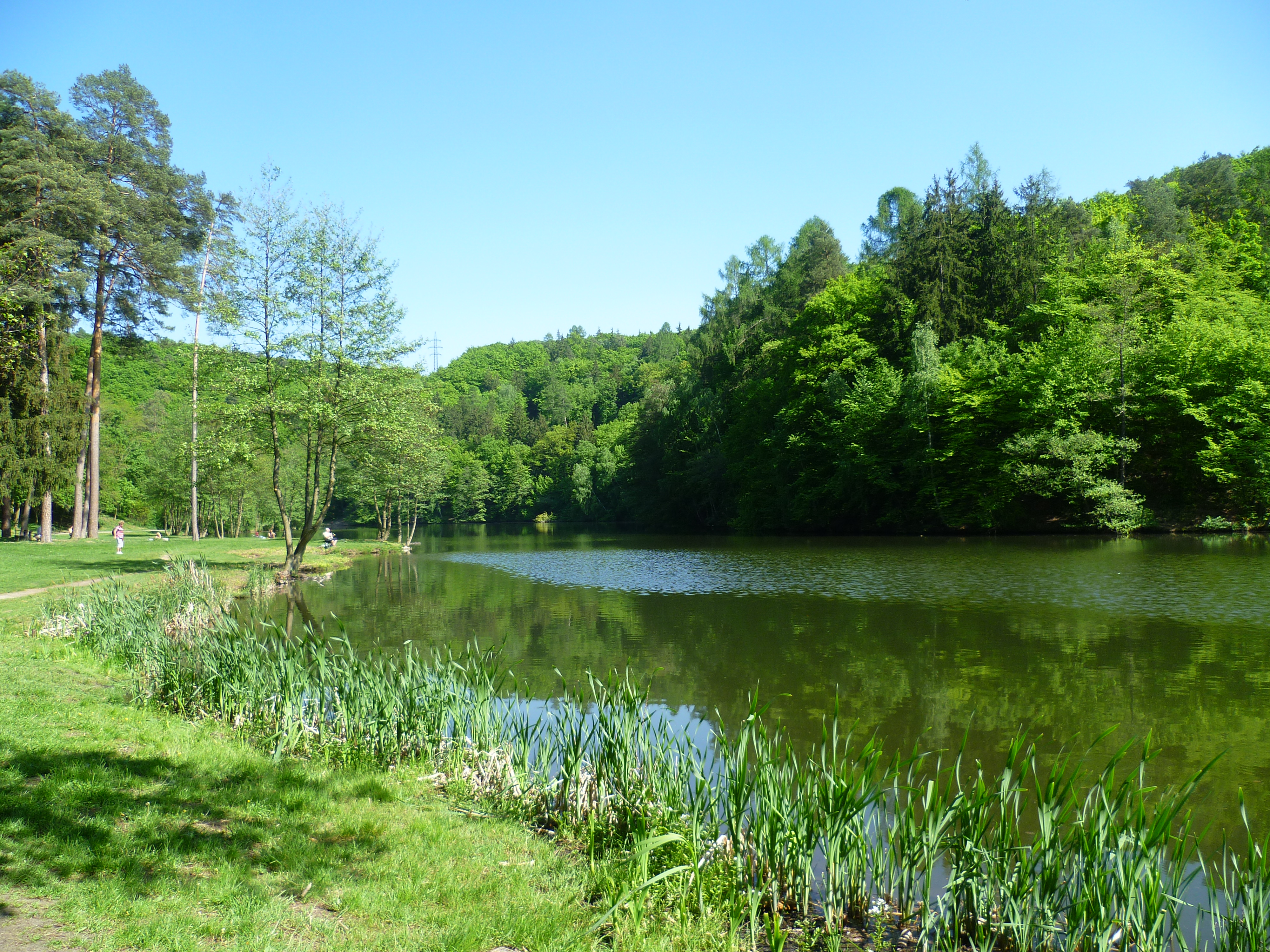 Mariánské údolí-alibaba